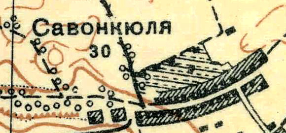 Топографическая карта Ленинградской области, квадрат О-35-24-Б-а (Переярово), деревня Саванкюля